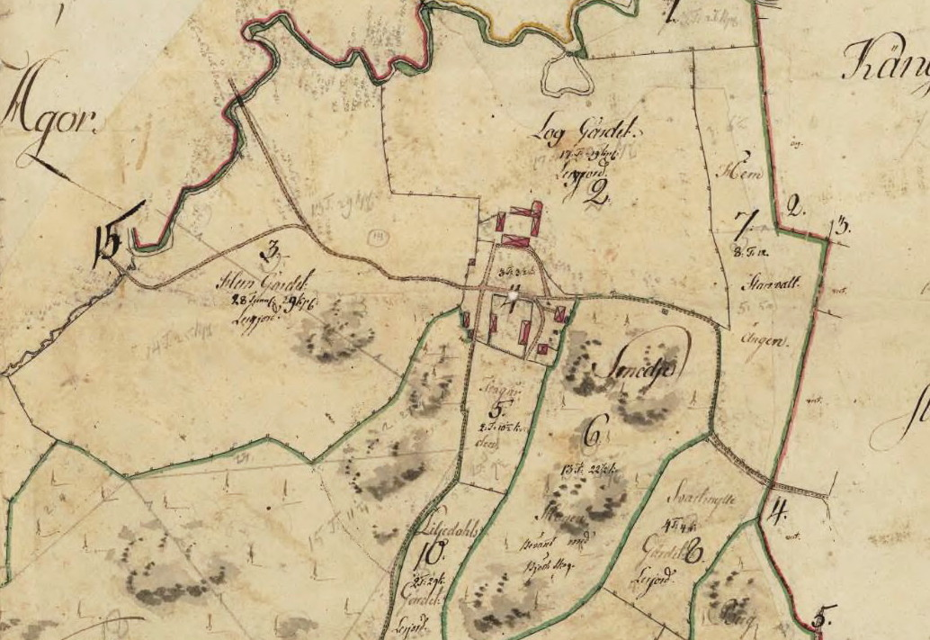 Charta öfver Ogesta och Skeringe (del av)